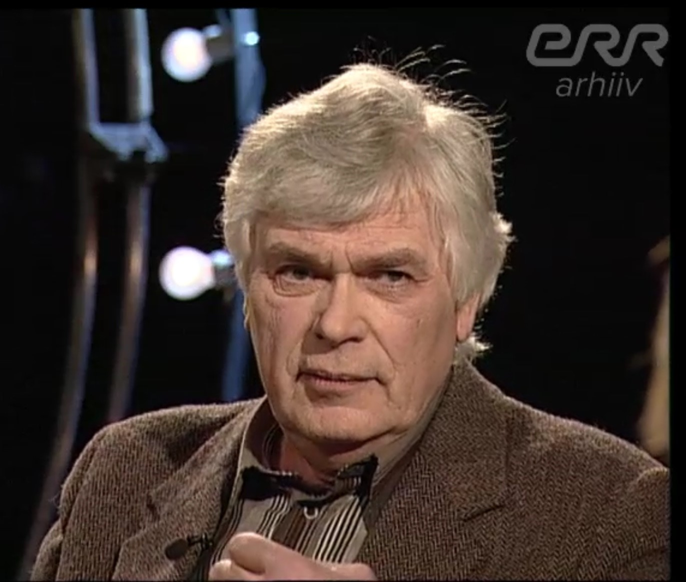 Märt Hunt. Kuvatõmmis ERR saatest „Tähelaev. Kadri Hunt“